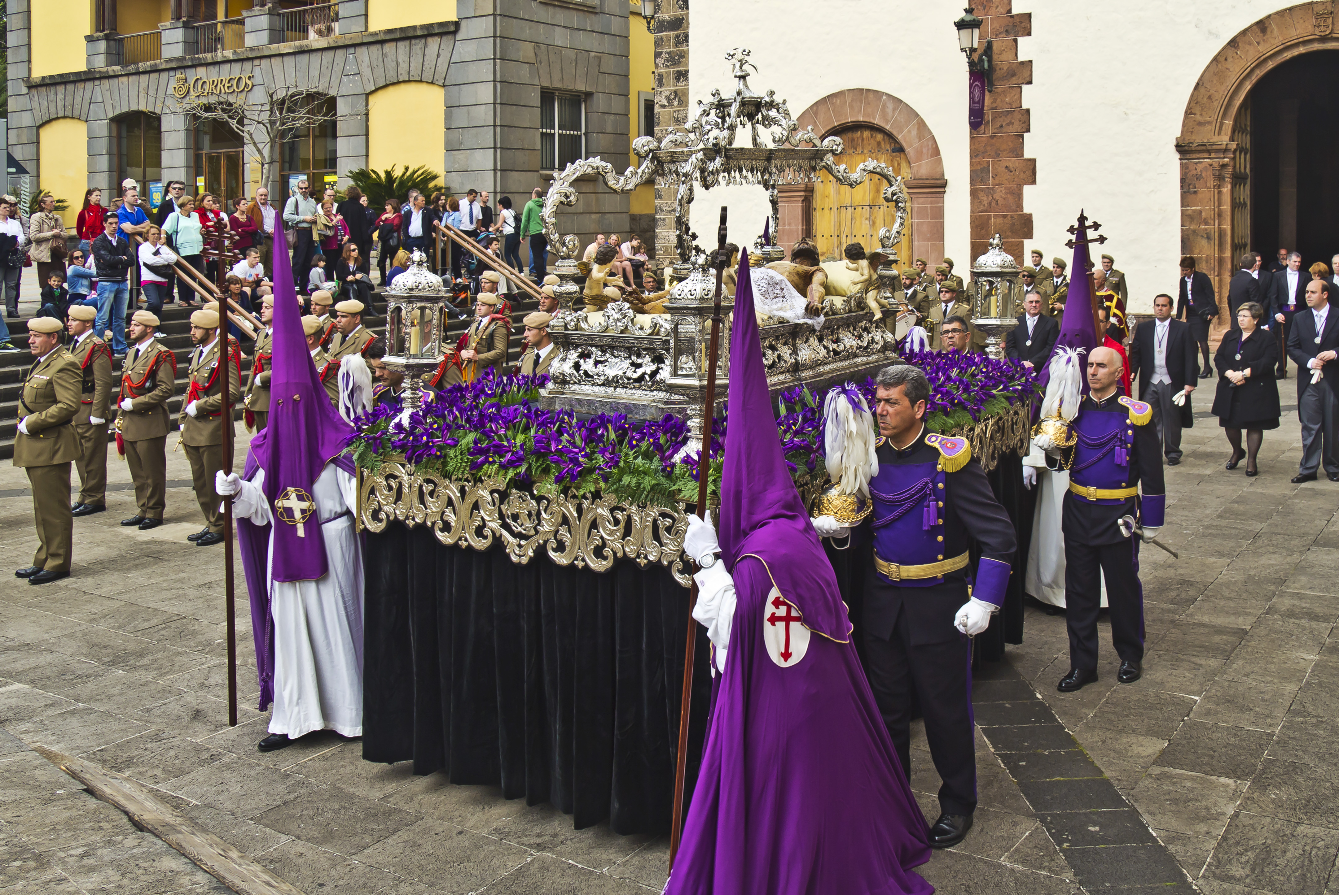 Procesión del Traslado del Santísimo Cristo Difunto desde la Iglesia de Santo Domingo / Paso del Santísimo Cristo Difunto